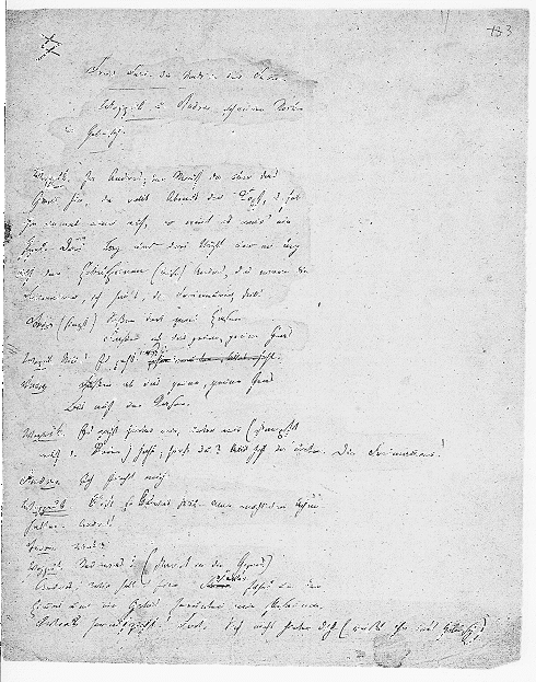 1. Seite der "Vorläufigen Reinschrift" von Georg Büchners Woyzeck